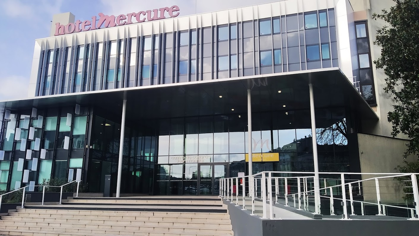 Le Centre des Congrès Jean-Monnier d'Angers.